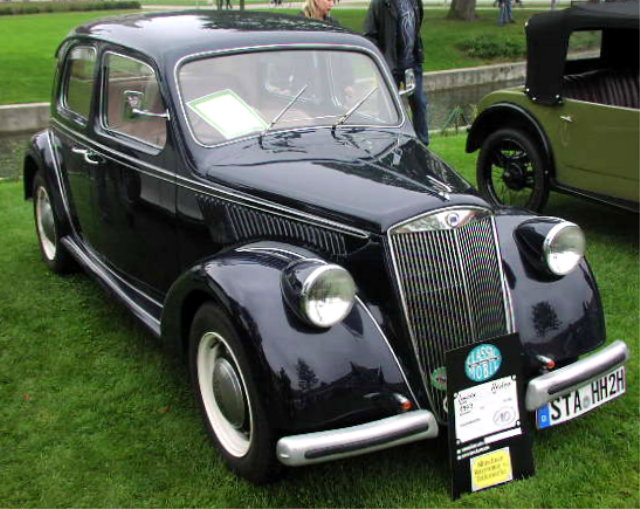 Lancia Ardea Sedan